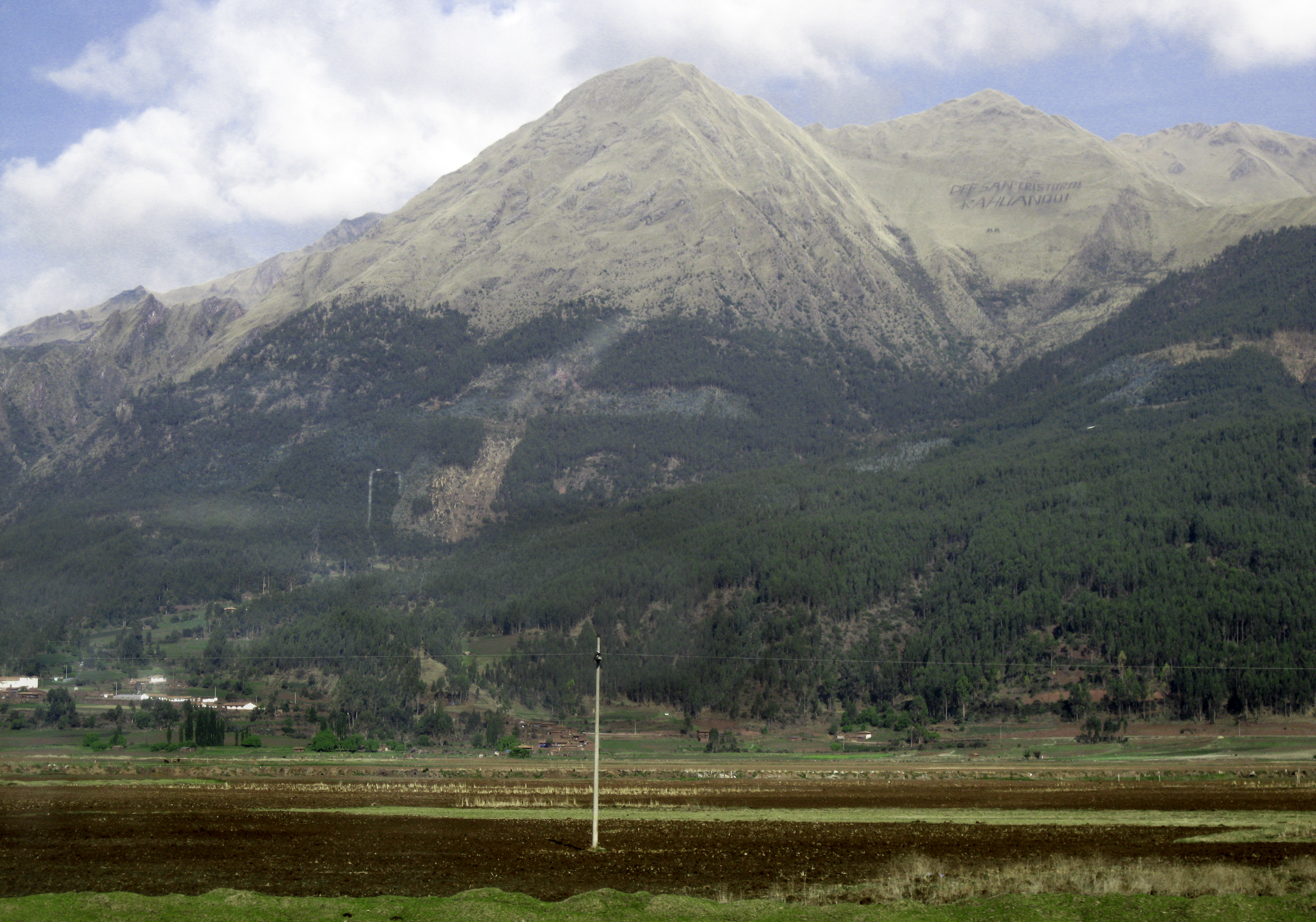 Margem do Rio Urubamba